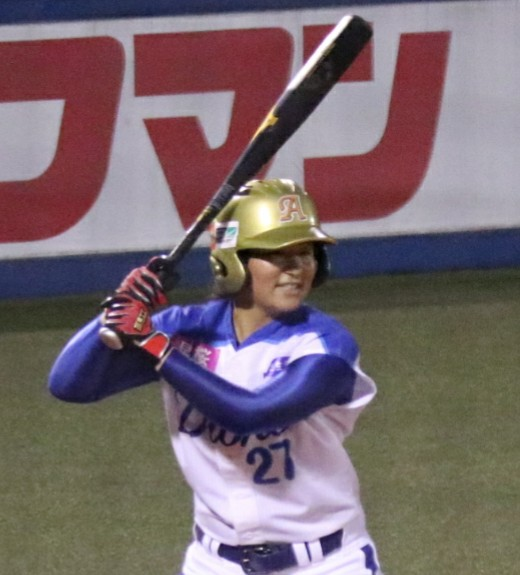 金城妃呂選手